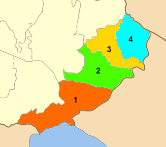 Χάρτης των ενοτήτων (και πρώην δήμων) από τις οποίες αποτελείται ο Δήμος Αμφίπολης στην Περιφέρεια Κεντρικής Μακεδονίας. 1 - Αμφίπολης 2 - Ροδολίβους 3 - Πρώτης 4 - Κορμίστας